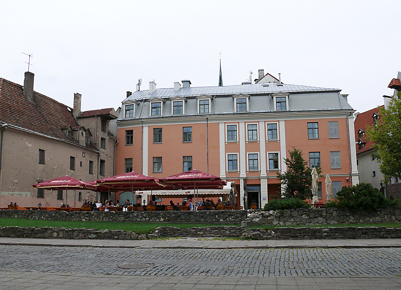 Alberta laukums Vecrīgā (1170 m2). Viena no vissenāk apdzīvotajām Rīgas vietām, kur Rīgas upes ielokā atradies lībiešu ciems. Arheoloģiskajos izrakumos atrastas arī mūrētas ēkas paliekas, kas iespējams celta vēl pirms 1201. gada. XVII gs. bija ierīkota zirgu pasta stacija, ko likvidēja XIX gs. 80. gados. Pasta kantora ēku un zirgu staļļus nojauca un 1889. gadā to vietā iekārtoja skvēru, ko 1890. gadā nosauca par "Alberta skvēru", bet 1923. gadā pārsauca par "Alberta laukumu". Fotogrāfējis A.Buks